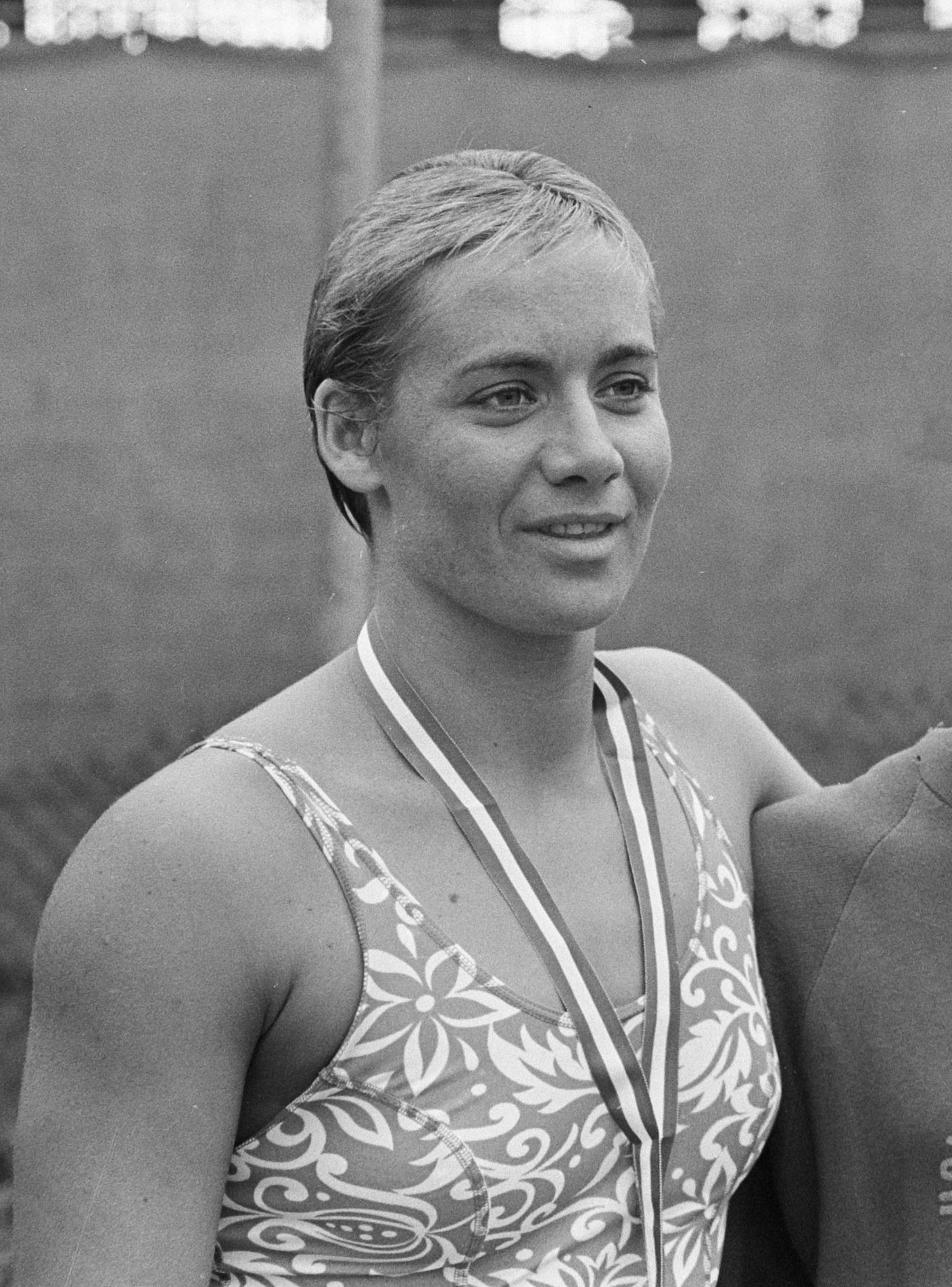 Betty Heukels